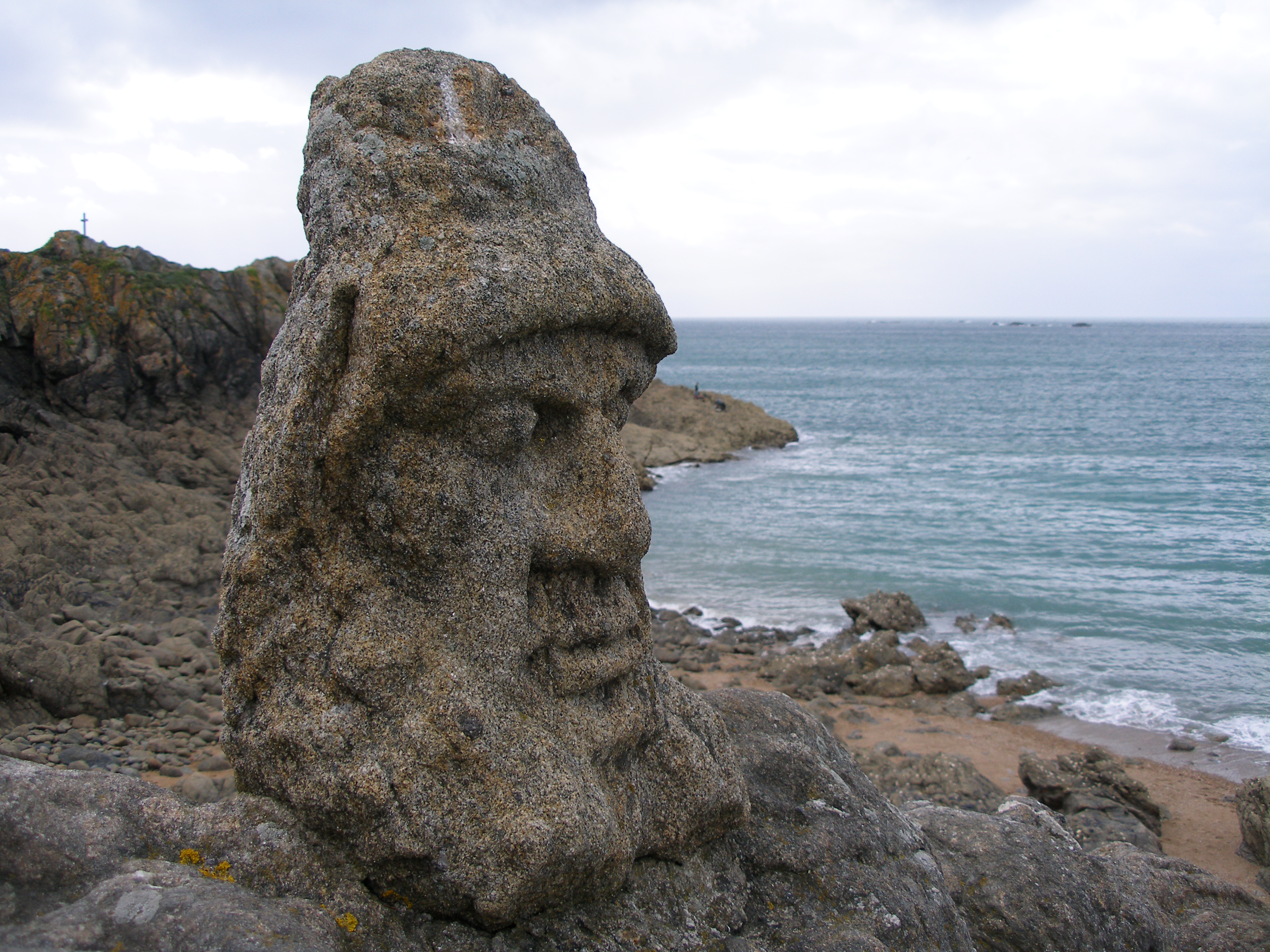 Rochers Sculptés à Rothéneuf (Saint-Malo)